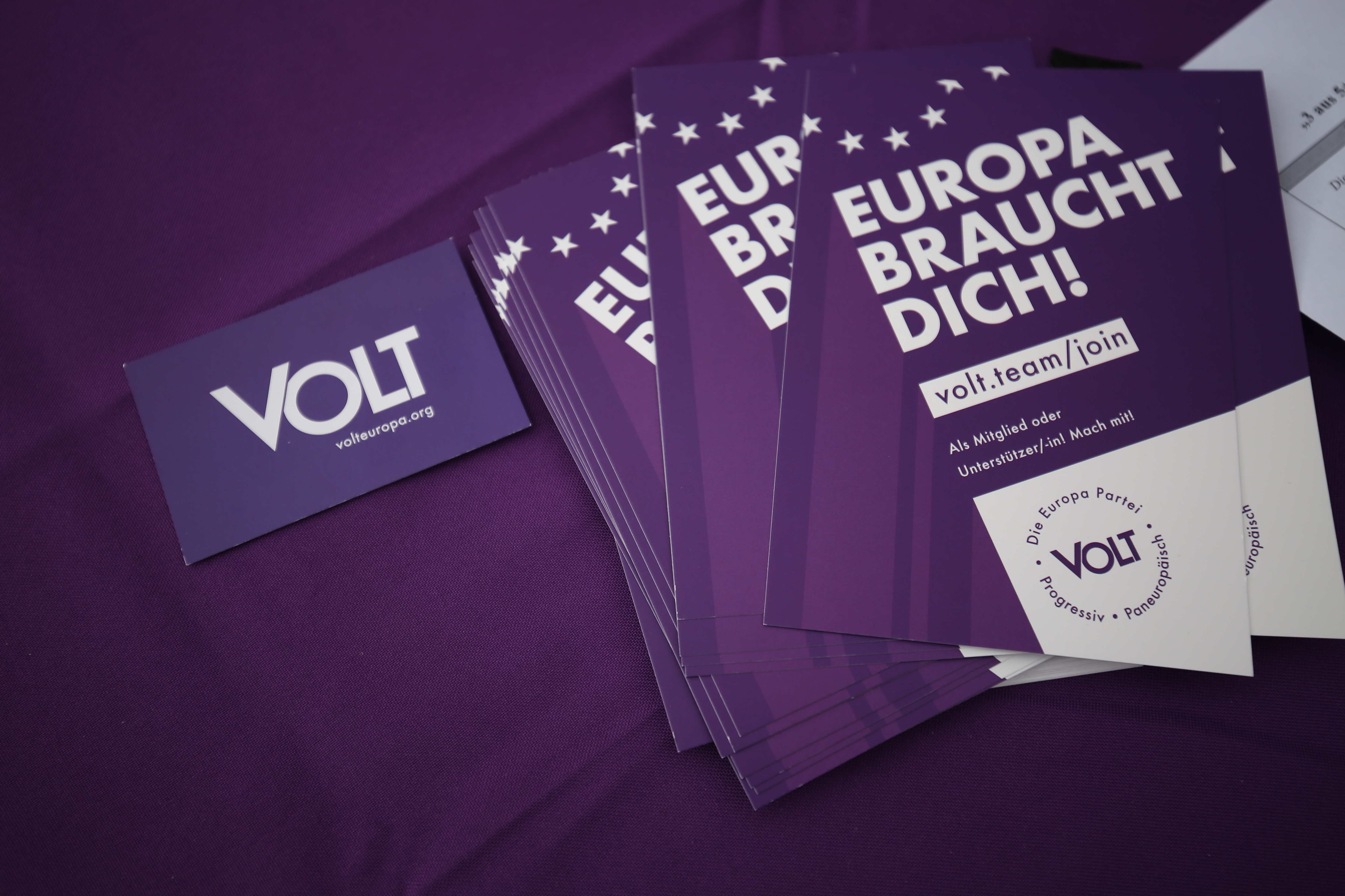 Volt Europa - pan-europäische Partei, gegründet 2017